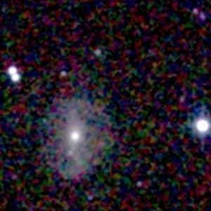 Galaxy NGC 53